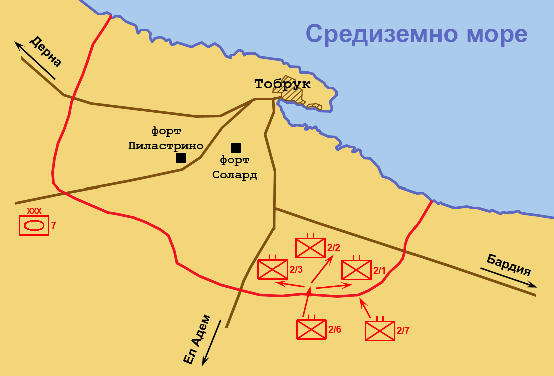 Атаката срещу Тобрук. Фаза първа, част първа.